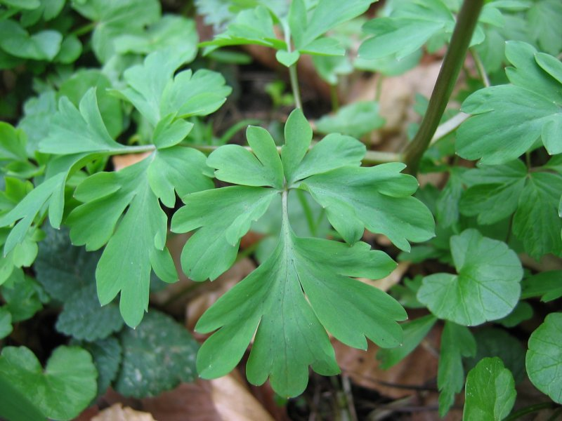 Blatt des Hohlen Lerchensporns Corydalis cava, Pölchow bei Rostock